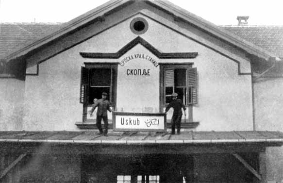 Promena naziva grada iz Uskub u Skoplje, nakon srpskog zauzeća 1912.